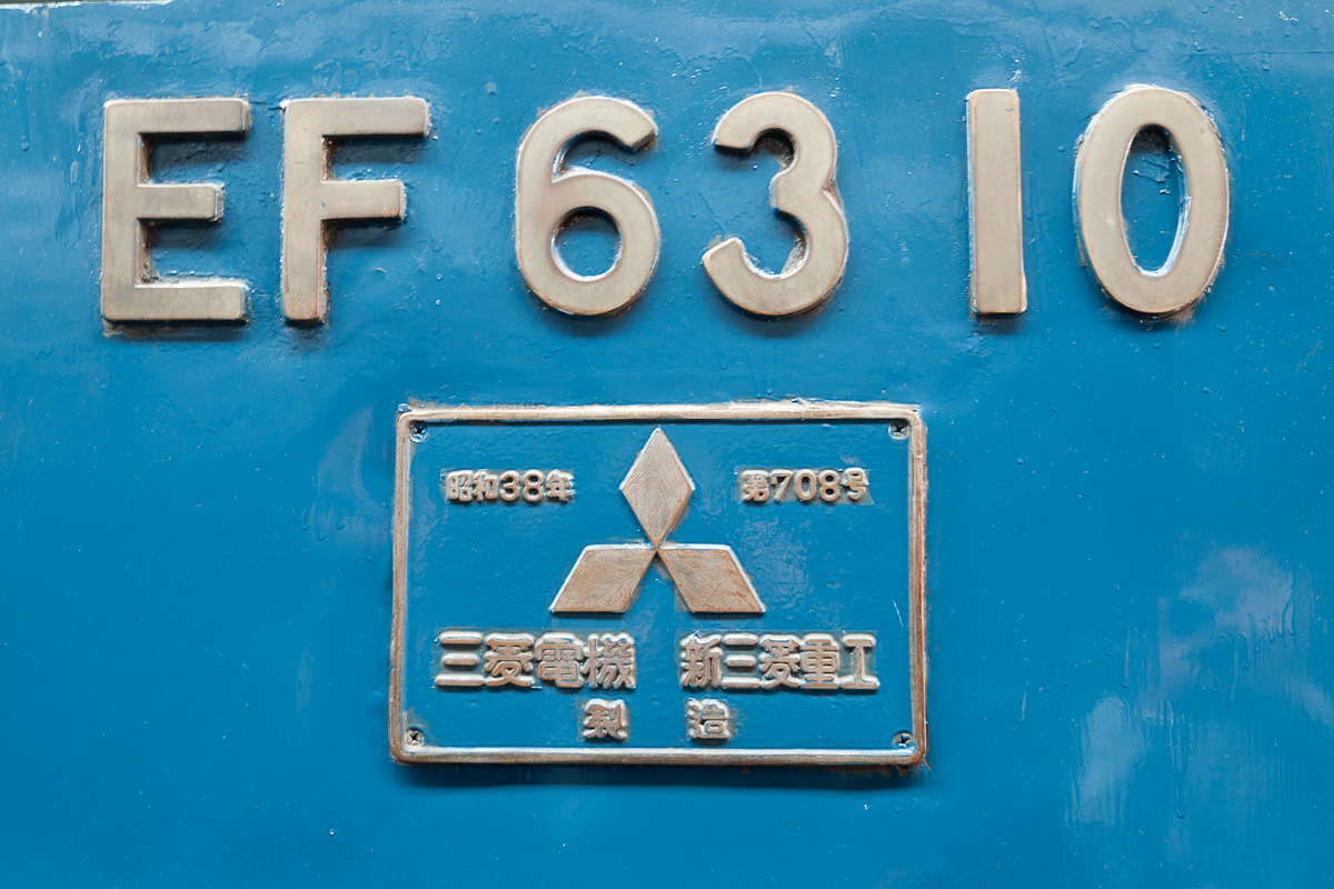 EF63形電気機関車（EF6310）の側面番号と製造銘板、碓氷鉄道文化むらの保存機。